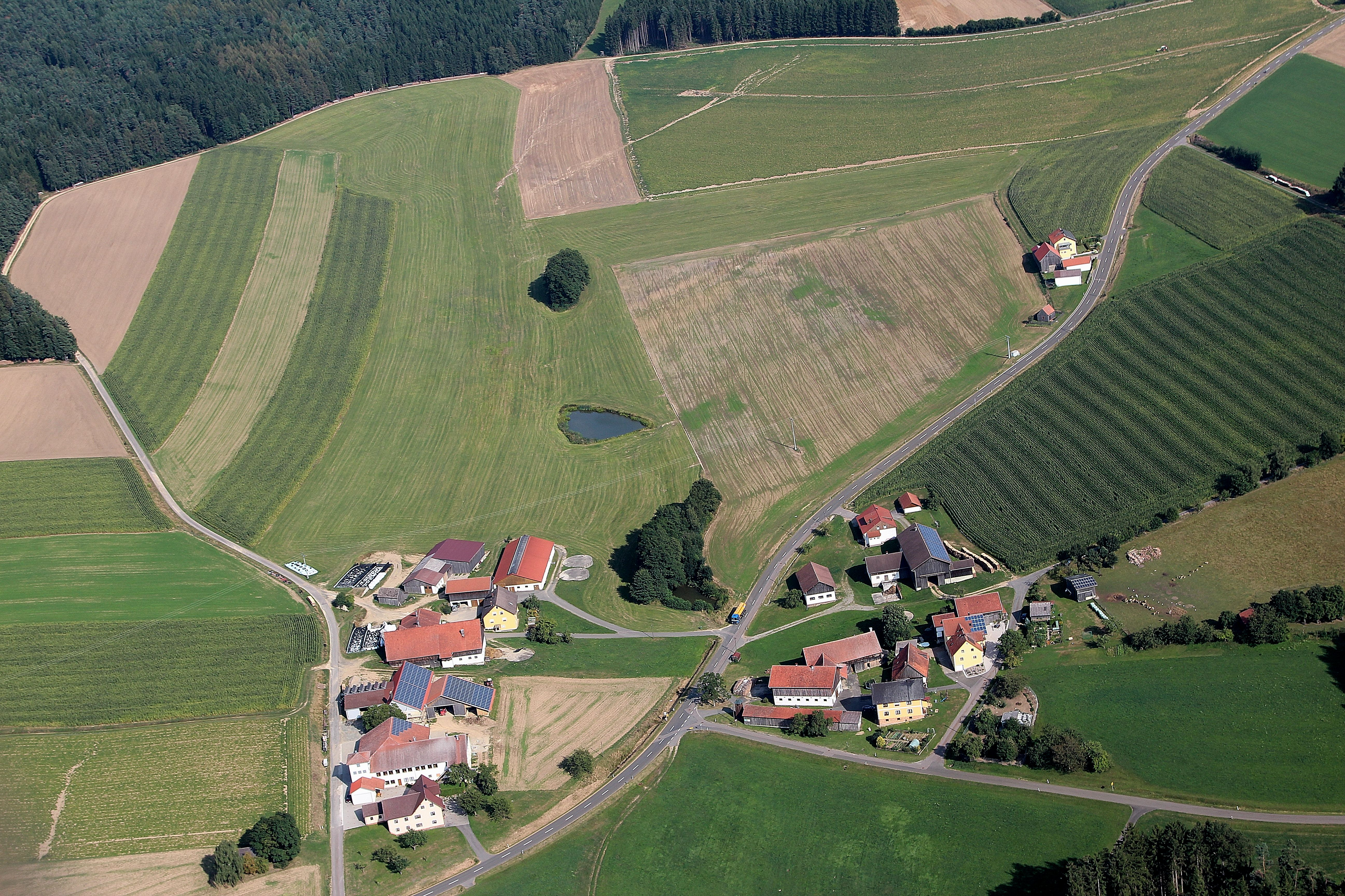 Sallach, Gemeinde Niedermurach, Landkreis Schwandorf, Oberpfalz, Bayern